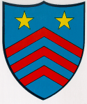 Wappen von Les Geneveys-sur-Coffrane Kanton Neuenburg Schweiz